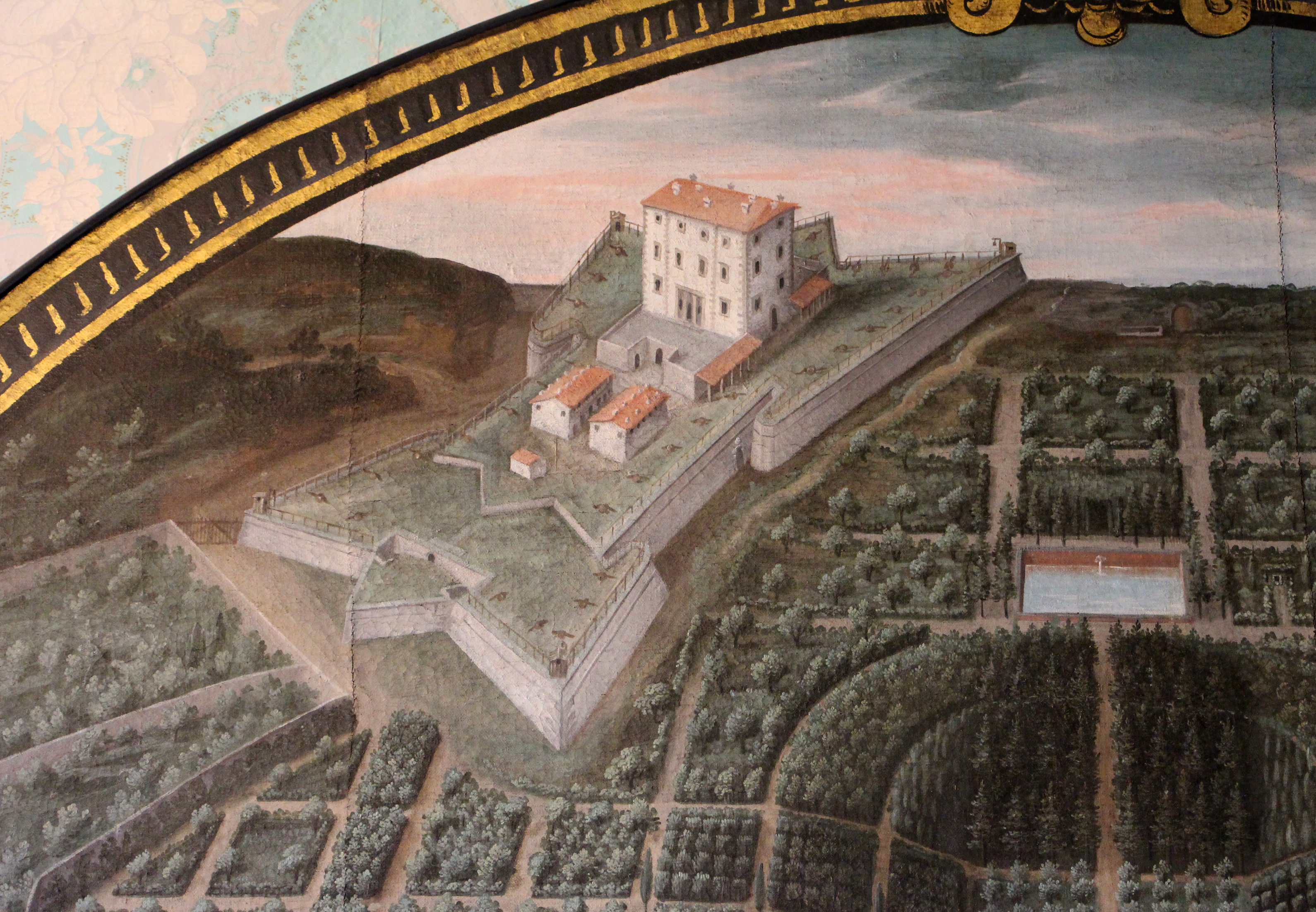 Villa medicea della Petraia - MIBAC The making of this document was supported by Wikimedia CH. (Submit your project!) For all the files concerned, please see the category Supported by Wikimedia CH. This is a photo of a monument which is part of cultural heritage of Italy.